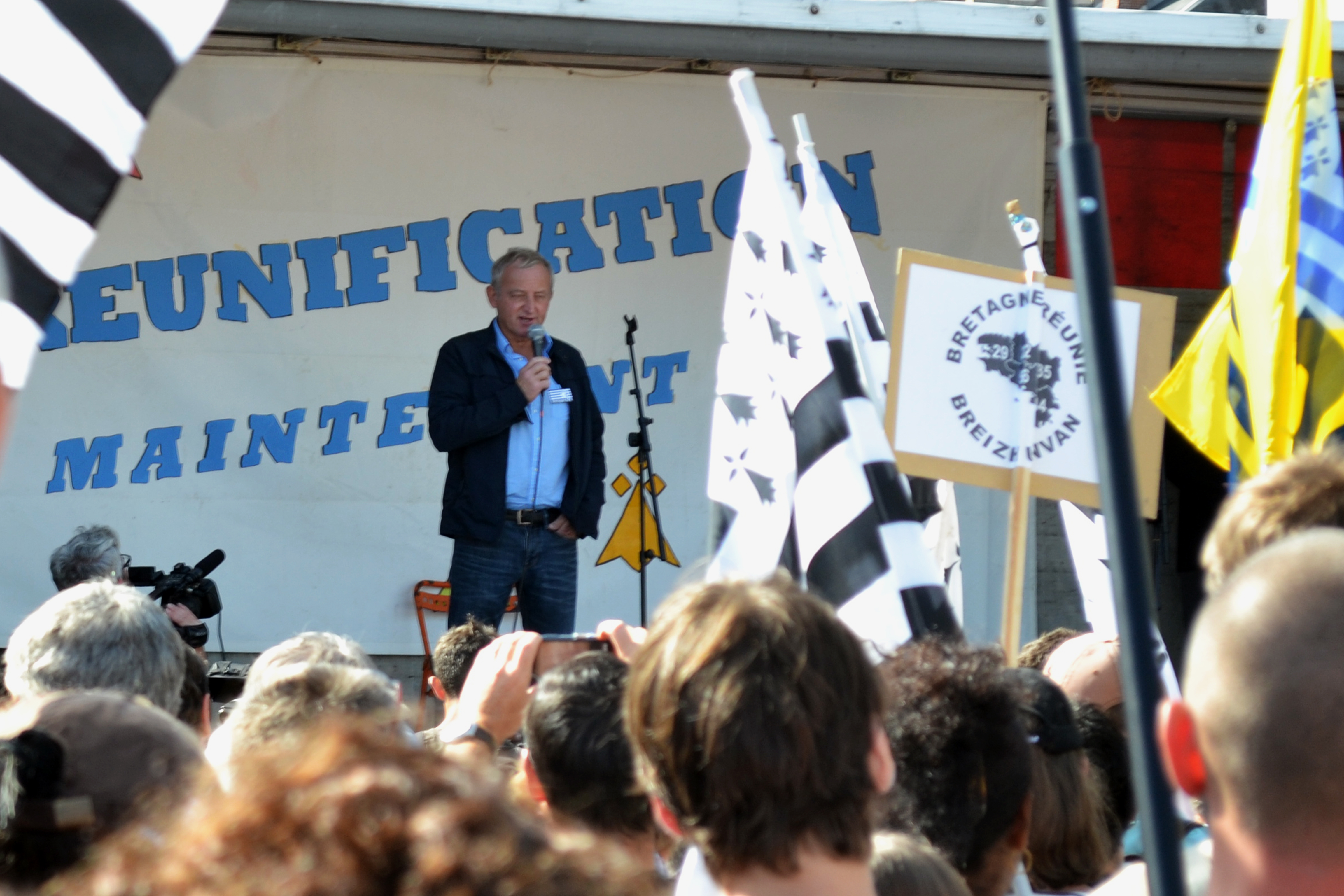 Des milliers de drapeaux bretons brandis à Nantes le 27 septembre 2014 pour célébrer la Bretagne entière et son projet d'avenir commun. La 3e grande manifestation populaire de l'année revendiquait une cohérence territoriale, économique, culturelle, pour que la péninsule plus que millénaire conserve son unité.